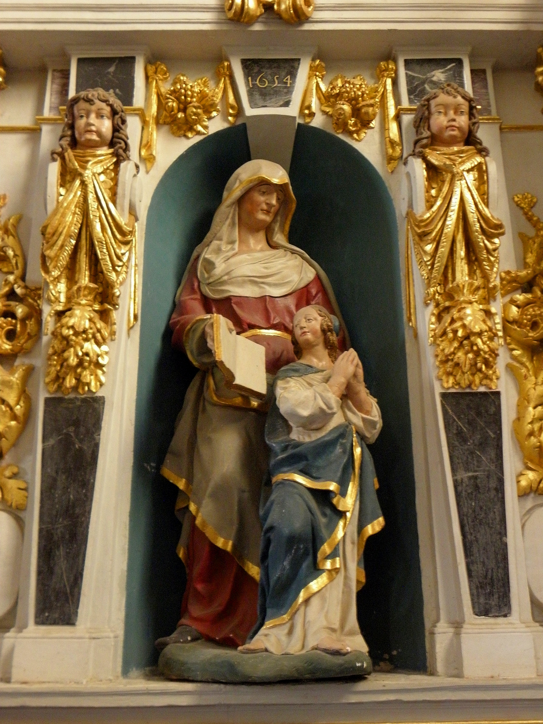 Retable de Sainte-Anne de l'église Saint-Crépin-et-Saint-Crépinien de Rannée (35). Statue de l'éducation de la Vierge par Sainte-Anne.